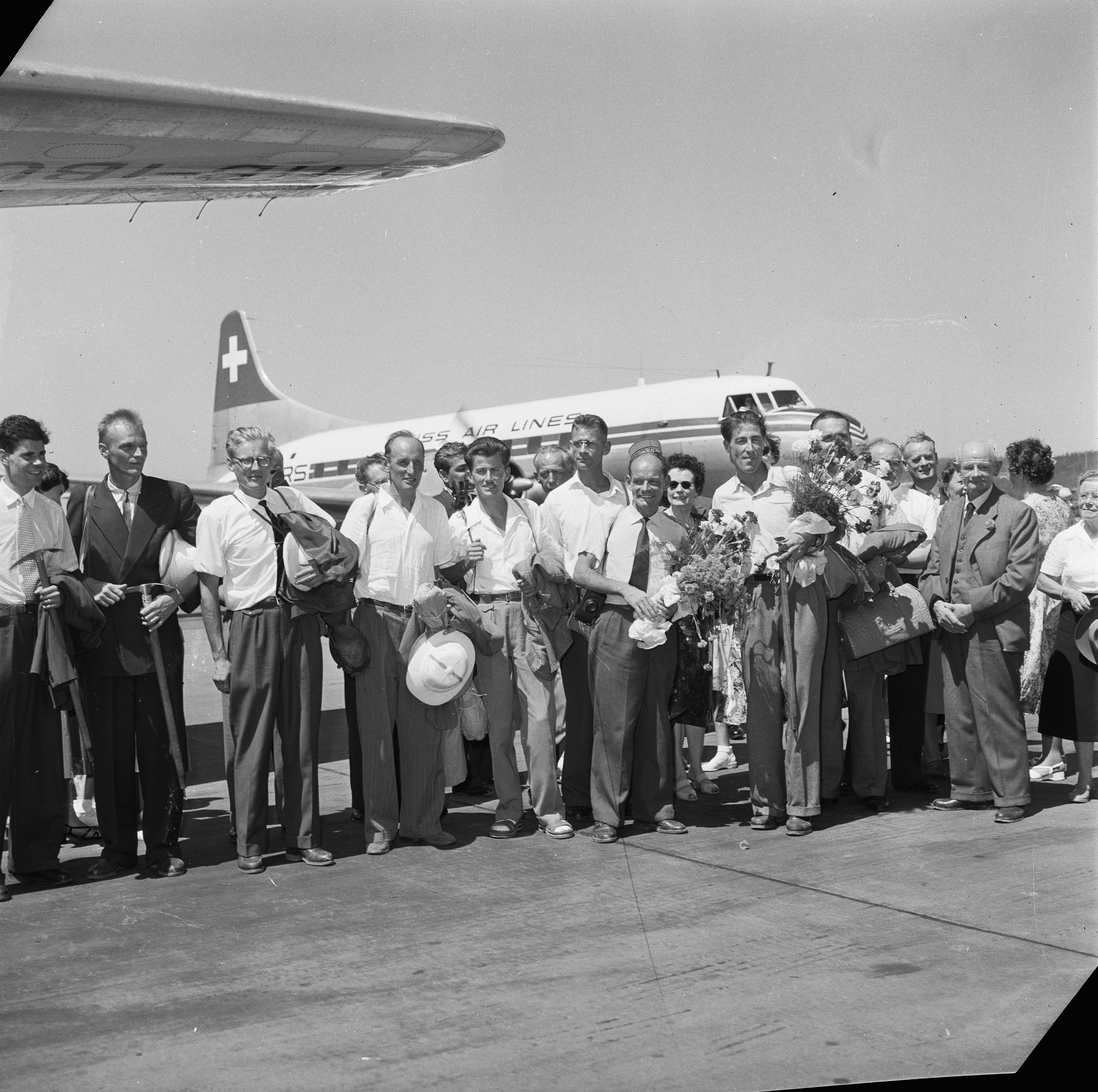 Schweizer Himalaya-Expedition 1956: 2.v.l. Ernst Schmied, 3.v.l. Jürg Marmet, 5.v.l. Edi Leuthold, Arzt, kleiner Mann mit Blumen und Kamera: Adolf Reist, Fotograf, rechts neben ihm Ernst Reiss (Bergsteigerchef der Schweizer Everest-Lhotse-Expedition, Reiss wuchs in Davos auf, lernte Schlosser und arbeitete als Fluzeugspengler auf dem Flugplatz Unterbach bei Meiringen), 2. Reihe 3. Mann: Albert Eggler, Expeditionsleiter. Teilnehmer: Albert Eggler (Leiter), Hans-Rudolf von Gunten, Ernst Schmid, Jürg Marmet, Wolfgang Diehl, Hans Grimm, Fritz Luchsinger, Adolf Reist, Ernst Reiss. Erstbesteigung des Lhotse, zweimalige Besteigung des Mount Everest